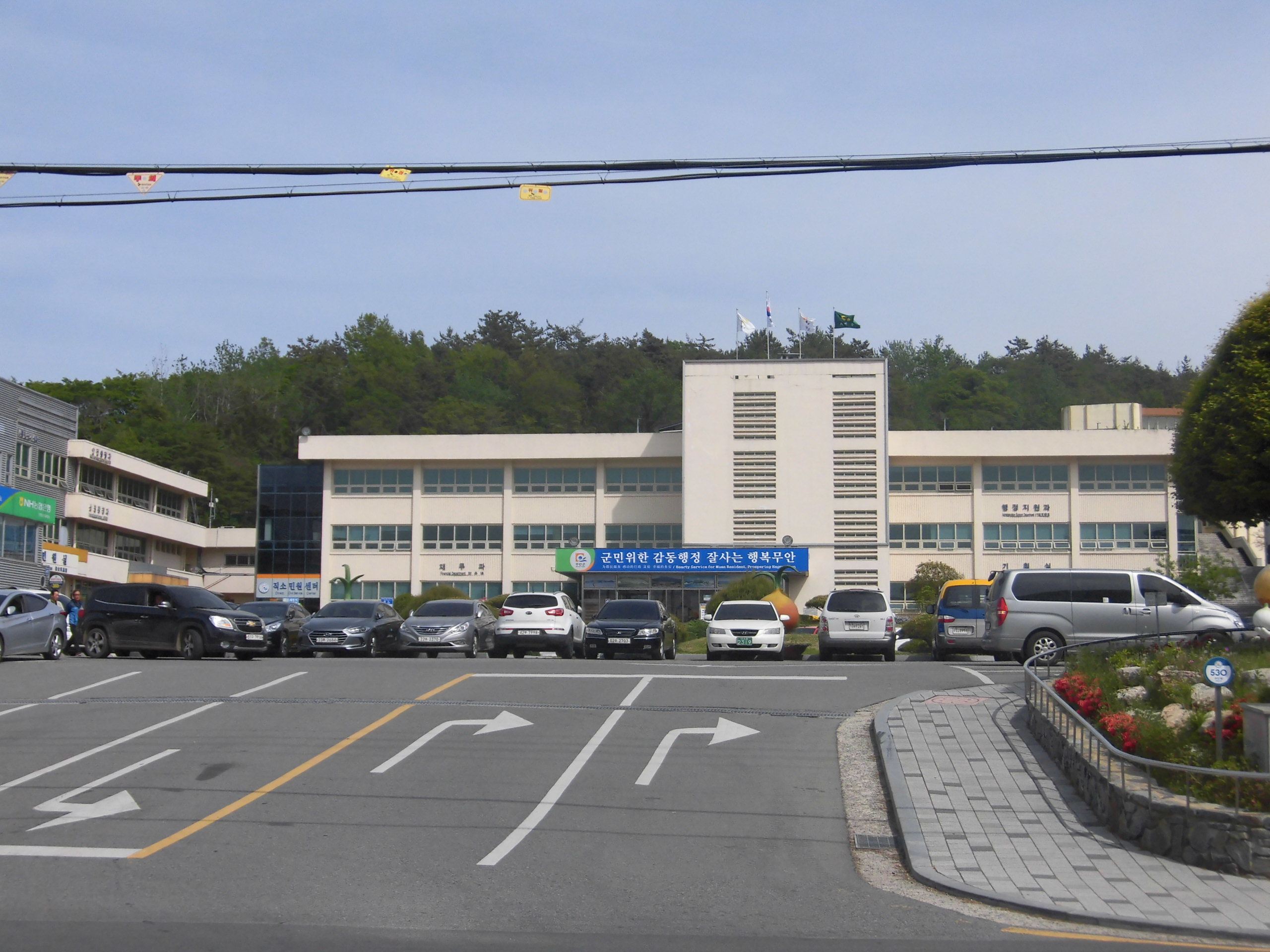 전라남도 무안군에 있는 무안군청 全羅南道務安郡にある務安郡庁